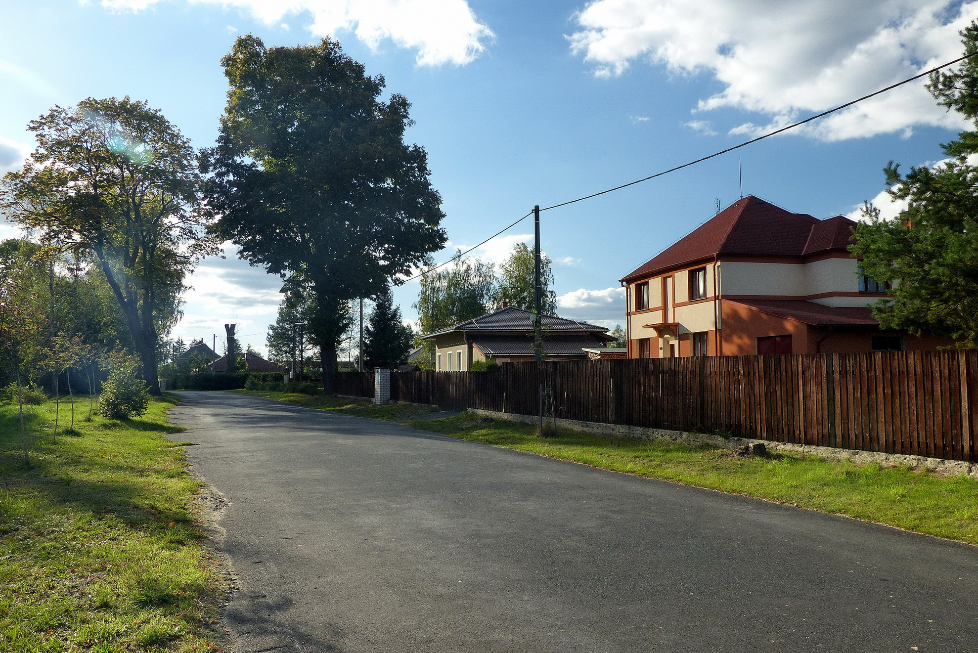 Hvězdov